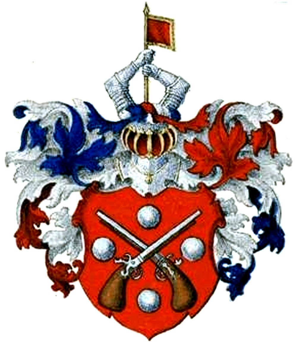 Pistohlkorsi suguvõsa aadlivapp